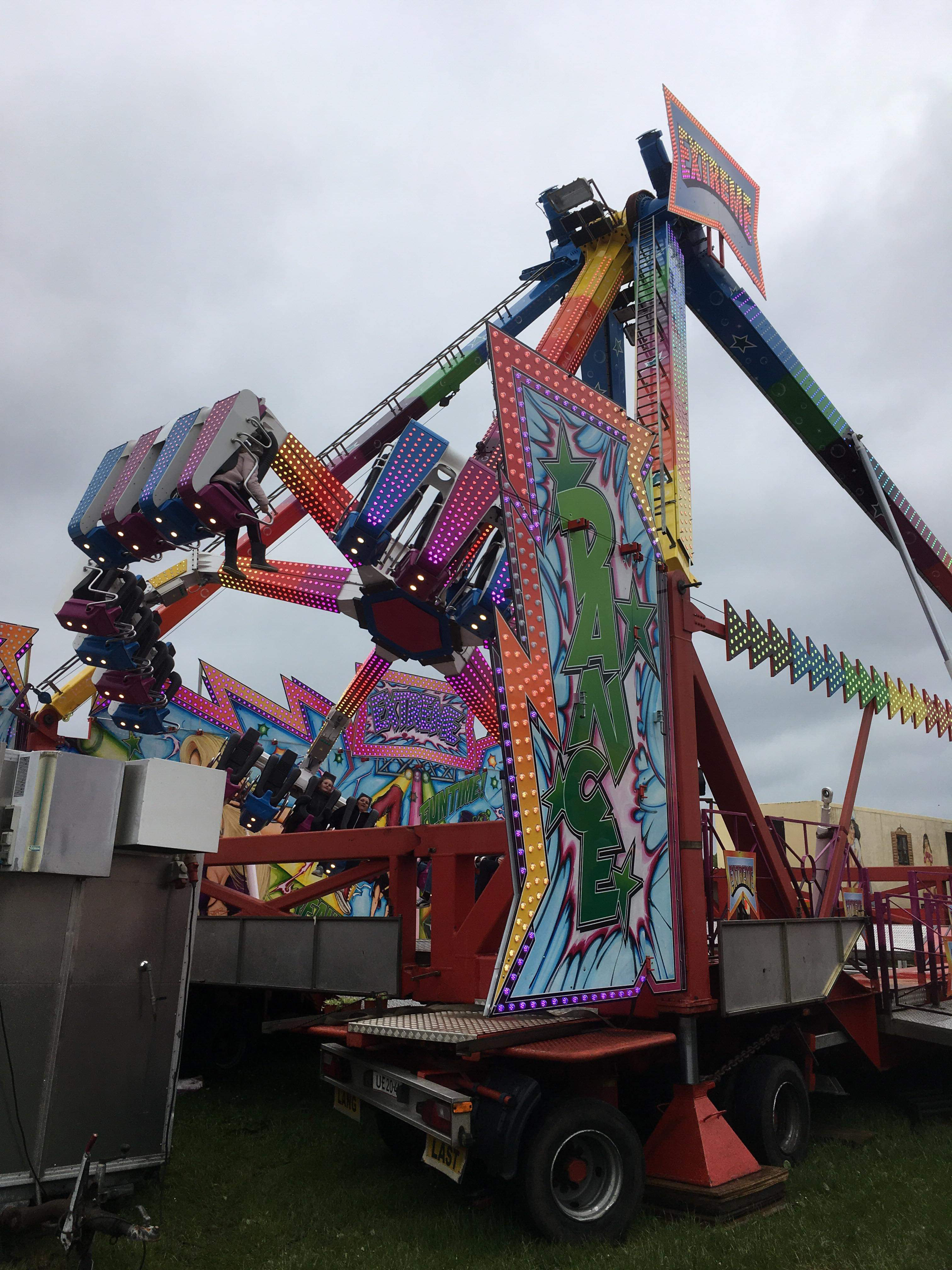 Nordisk Fun Fairs “Extreme” kendt som “Afterburner”.